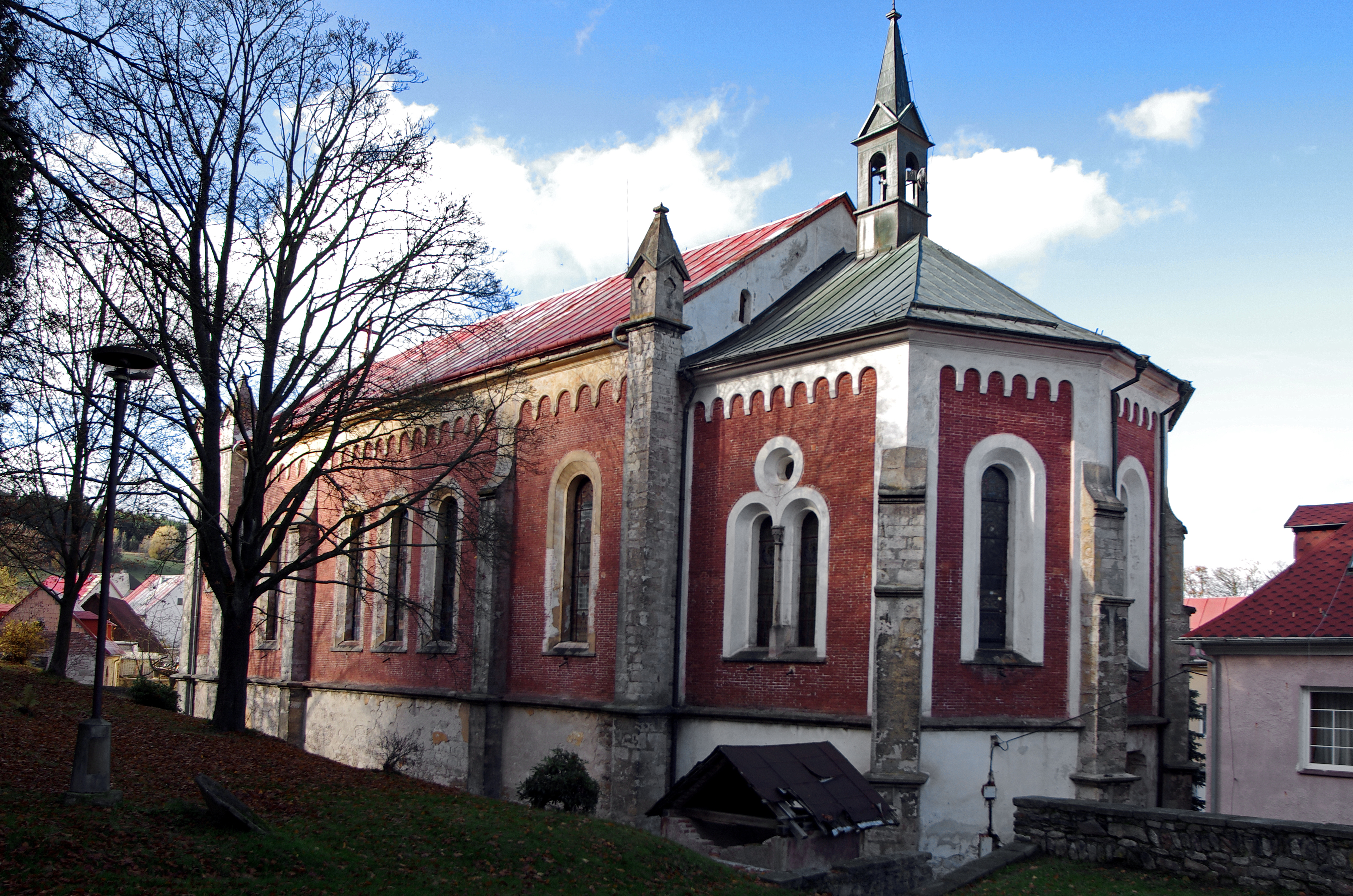 Krásno - kostel svaté Kateřiny, okres Sokolov